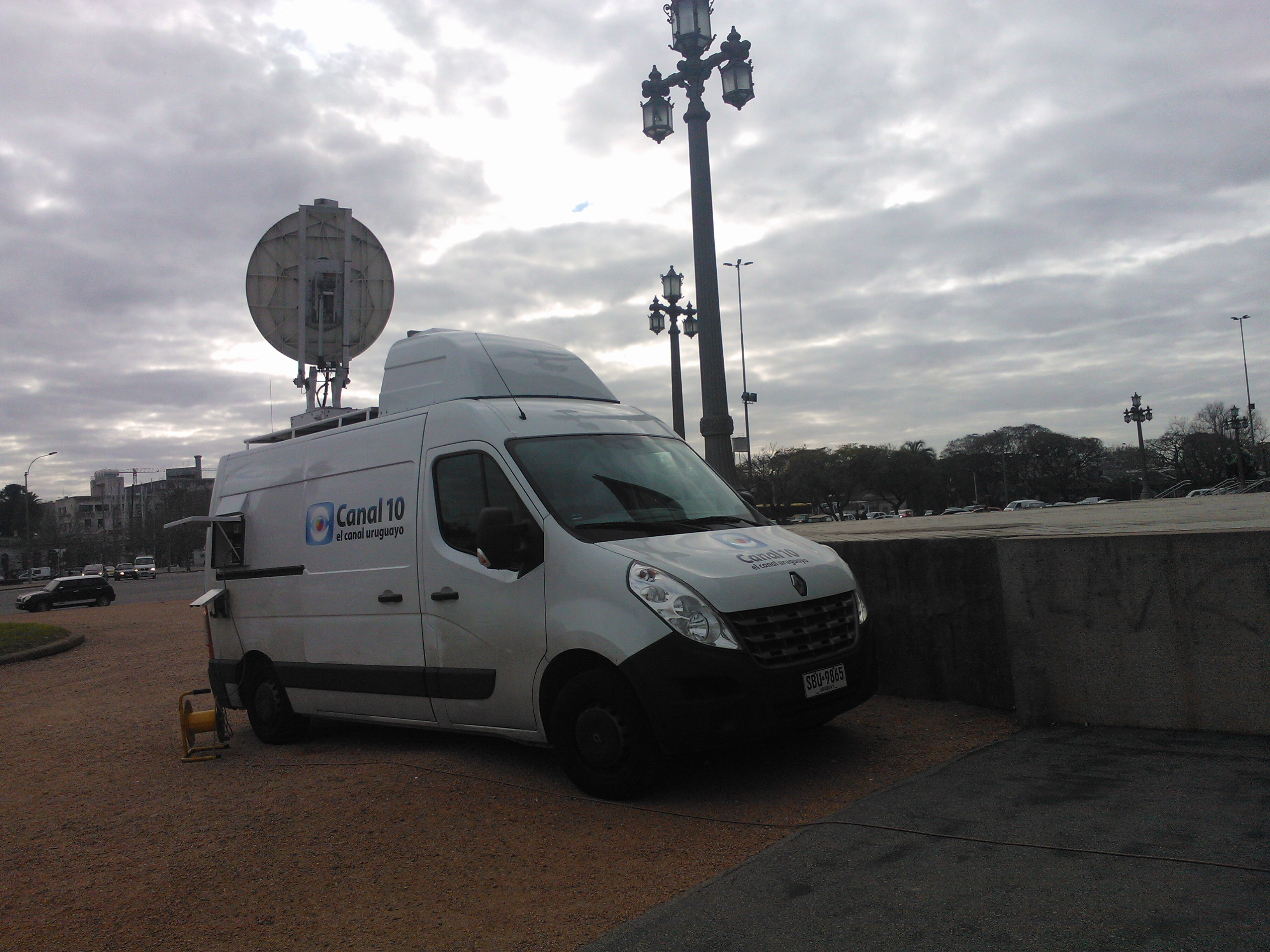 Móvil de Saeta TV Canal 10 Uruguay en las inmediaciones del Palacio Legislativo